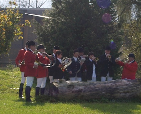 Jagdhornbläsergruppe zu Beginn einer Schleppjagd